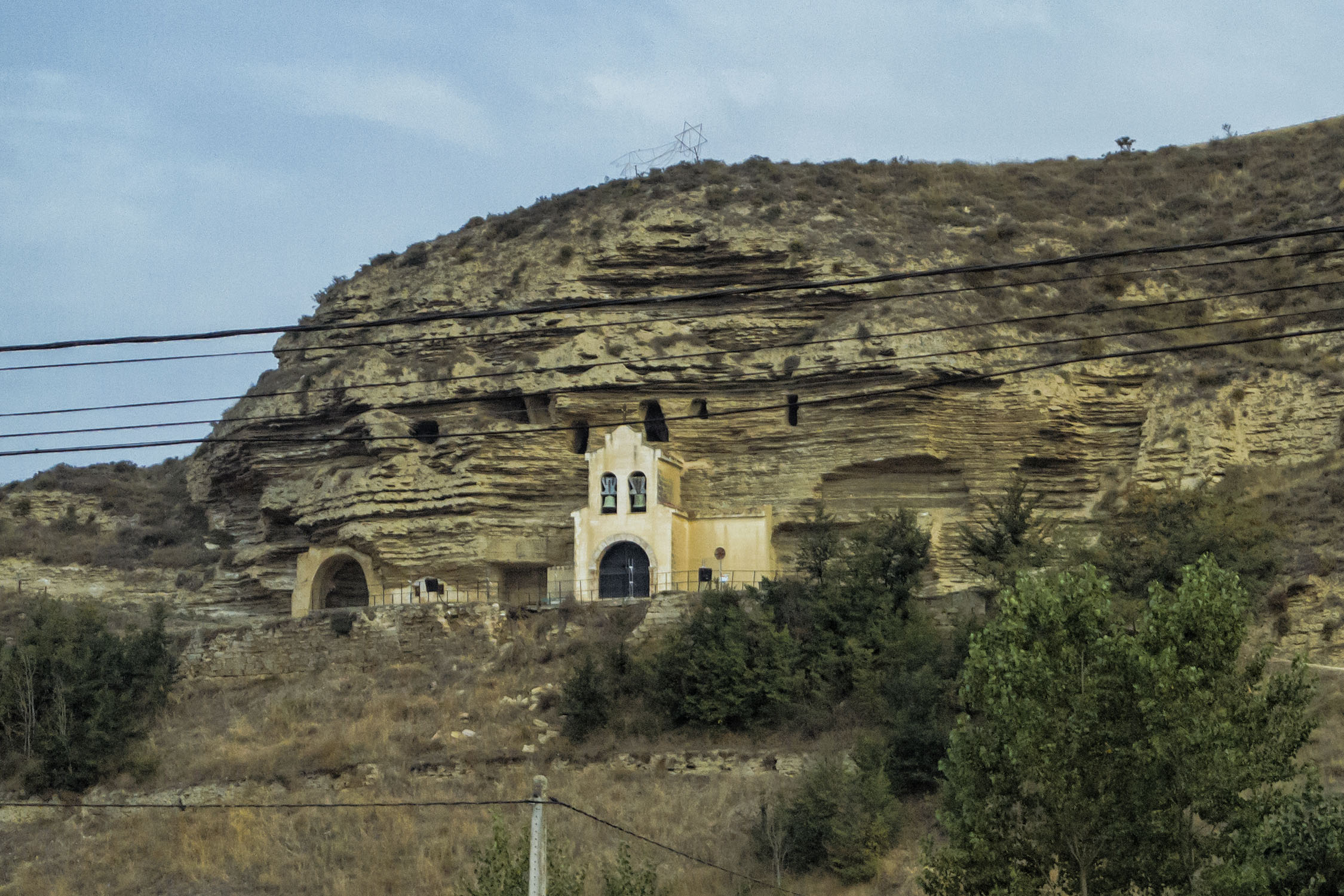 Ermita de la Virgen de la Peña de Tosantos